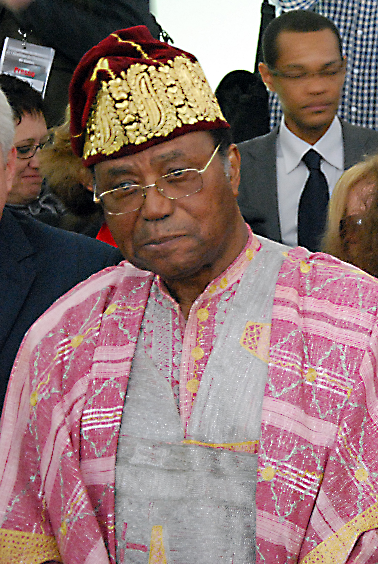 Nicéphore Soglo, à l'inauguration du Mémorial de l'abolition de l'esclavage de Nantes, le 25 mars 2012.